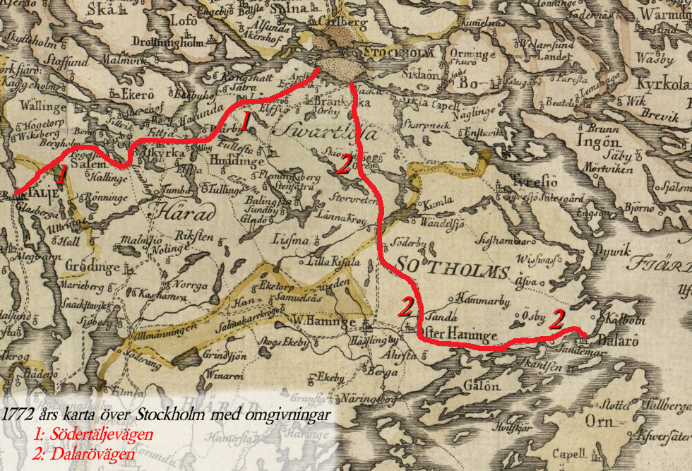 1772 års vägkarta över Stockholm med omgivningar